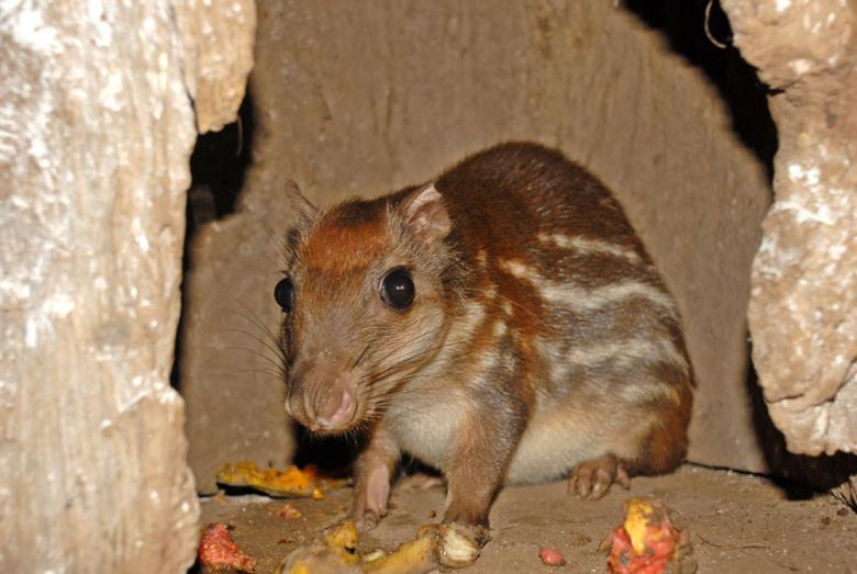 A paca é um animal encontrado na América do Sul. Ela vive nas florestas tropicais, de preferência perto de um rio ou riacho. Alvo de caçadores, esta espécie recebe atenção especial de pesquisadores e biólogos do projeto Caboquinho da Mata que garante a reprodução dos animais em cativeiro e soltura dos mesmos na floresta. (Foto: Angela Peres/Secom)